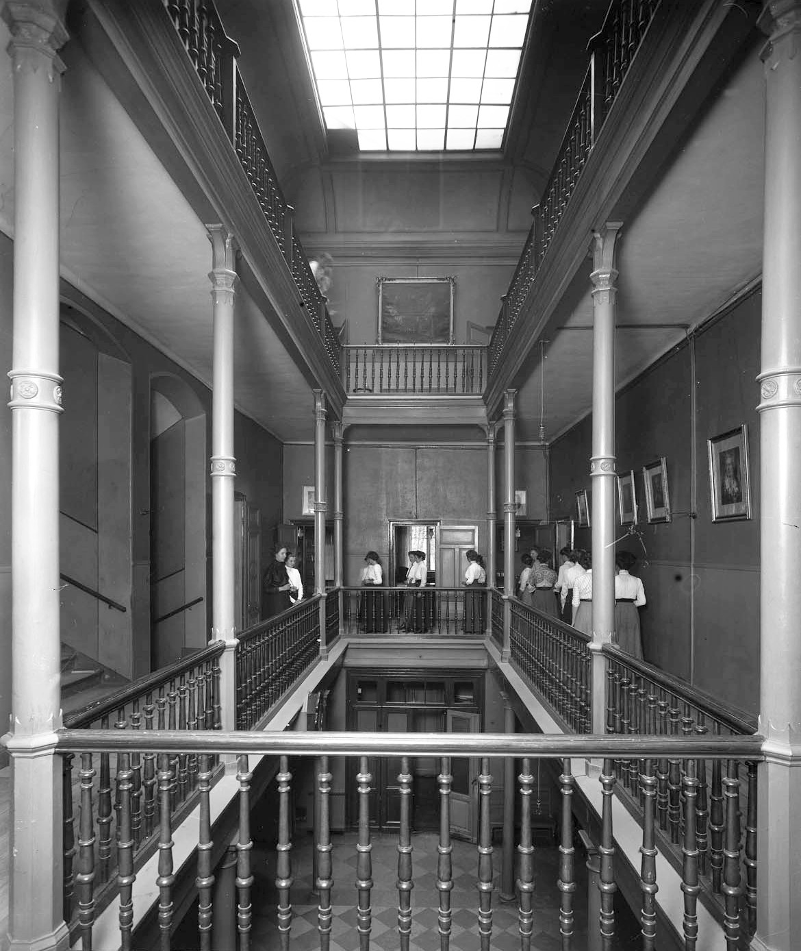 Interiörbild från Lärarinneseminariet, Riddargatan 6, Stockholm. Buggnaden ritad av Gustaf Sjöberg och uppförd 1871.I ljusgården, på trappavsatsen går en grupp unga kvinnor, troligen 1910-tal.